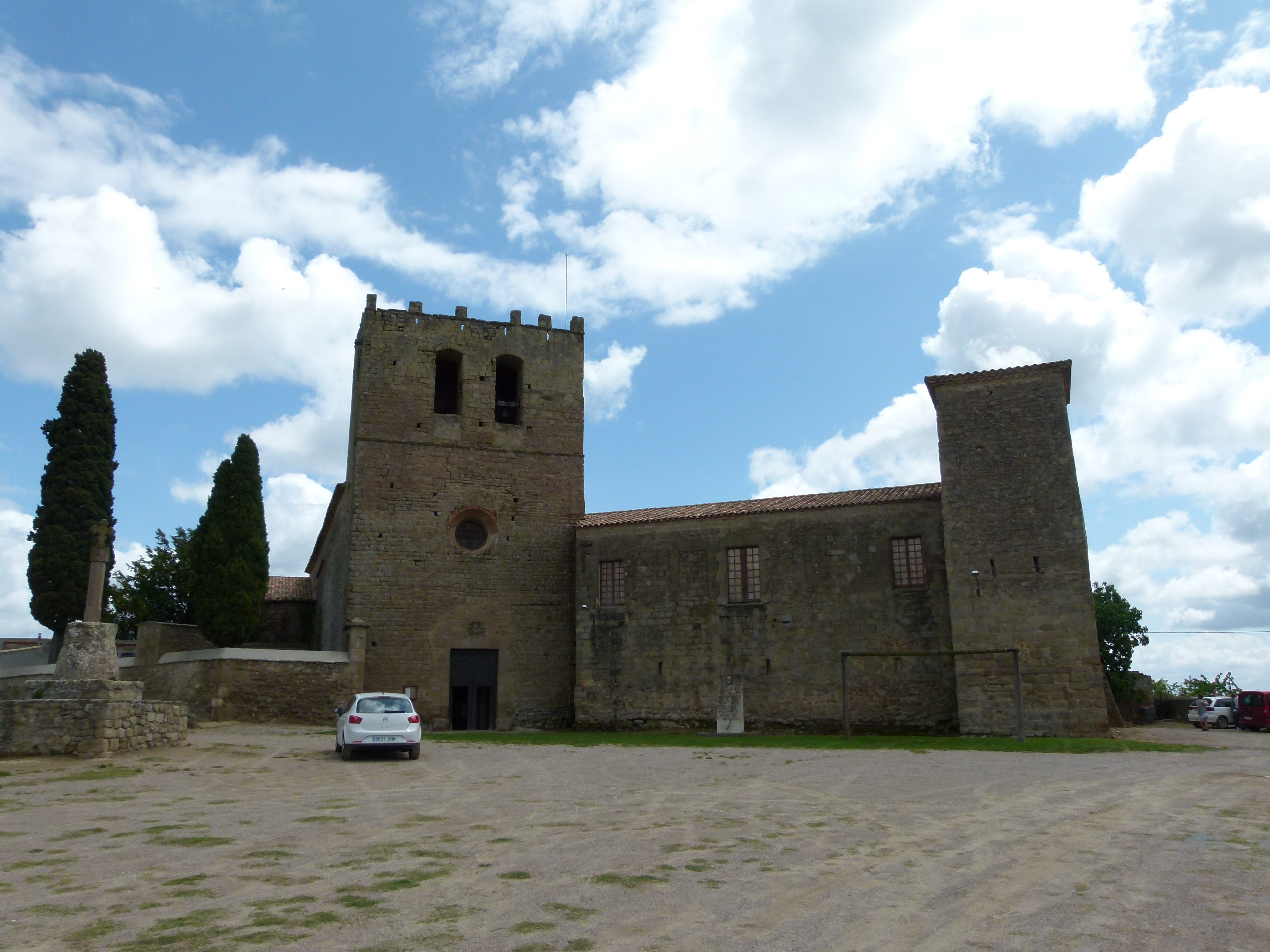 Monestir de Santa Maria de Serrateix, creu de terme, portal, campanar i palau i torre de l'Abat